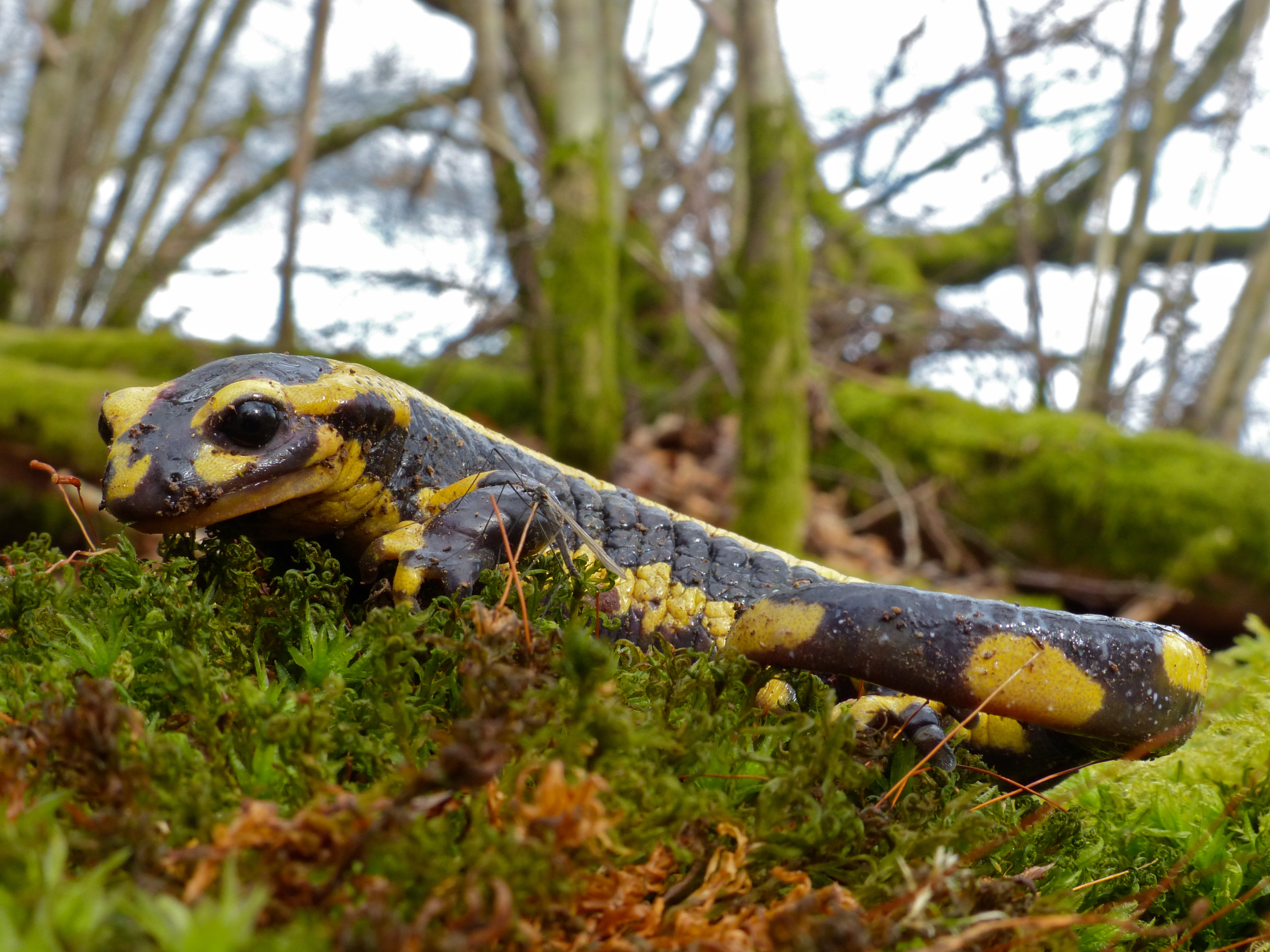 Forêt d' Ecouves, Orne, FRANCE